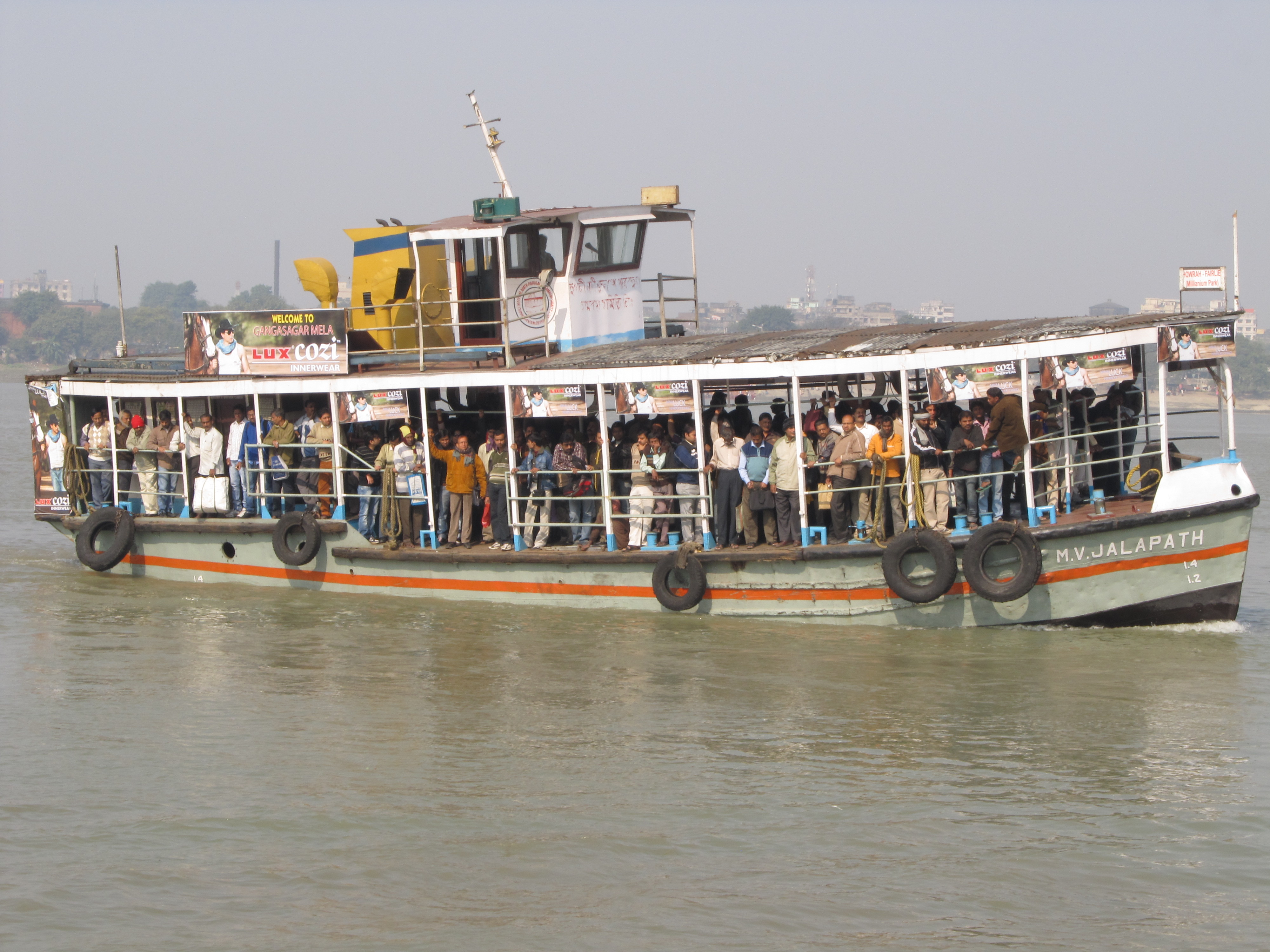 Photographed at Kolkata.